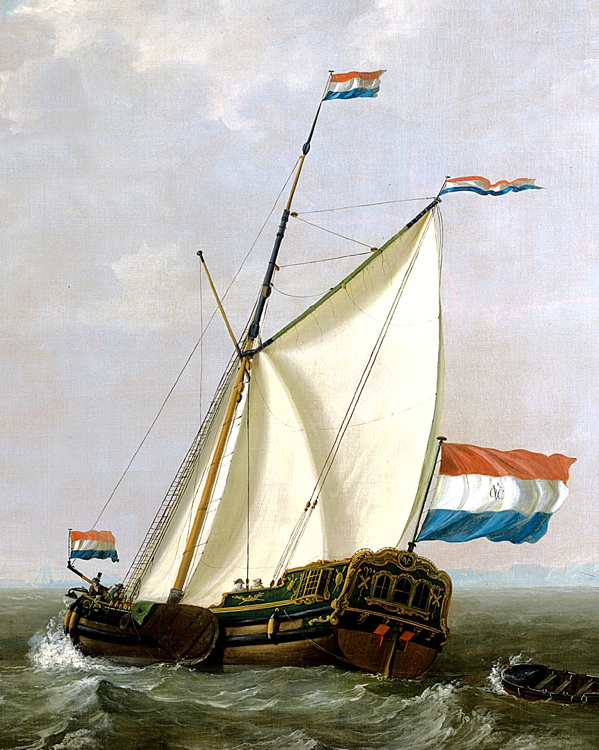 detail